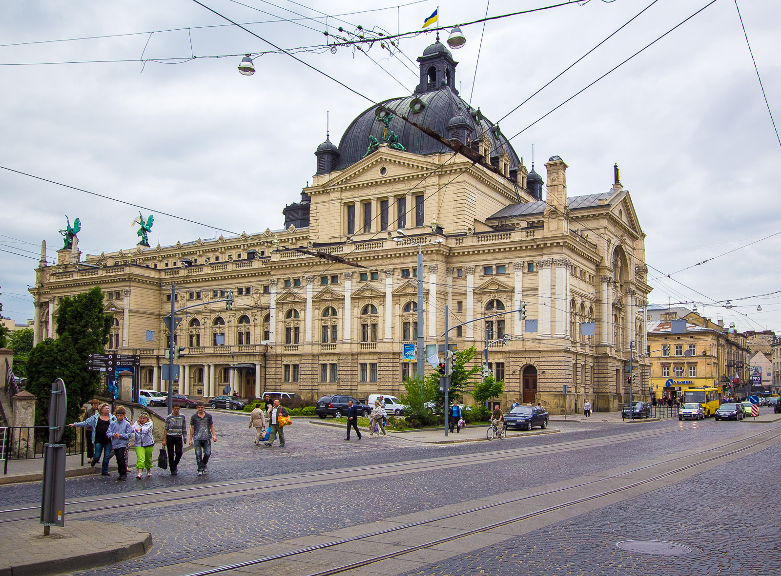 Театр опери та балету, в якому виступали видатні співаки, артисти, композитори світової слави, Львів, Свободи пр., 28